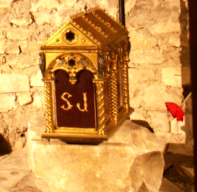 reliquaire XIXe de Julien de Brioude